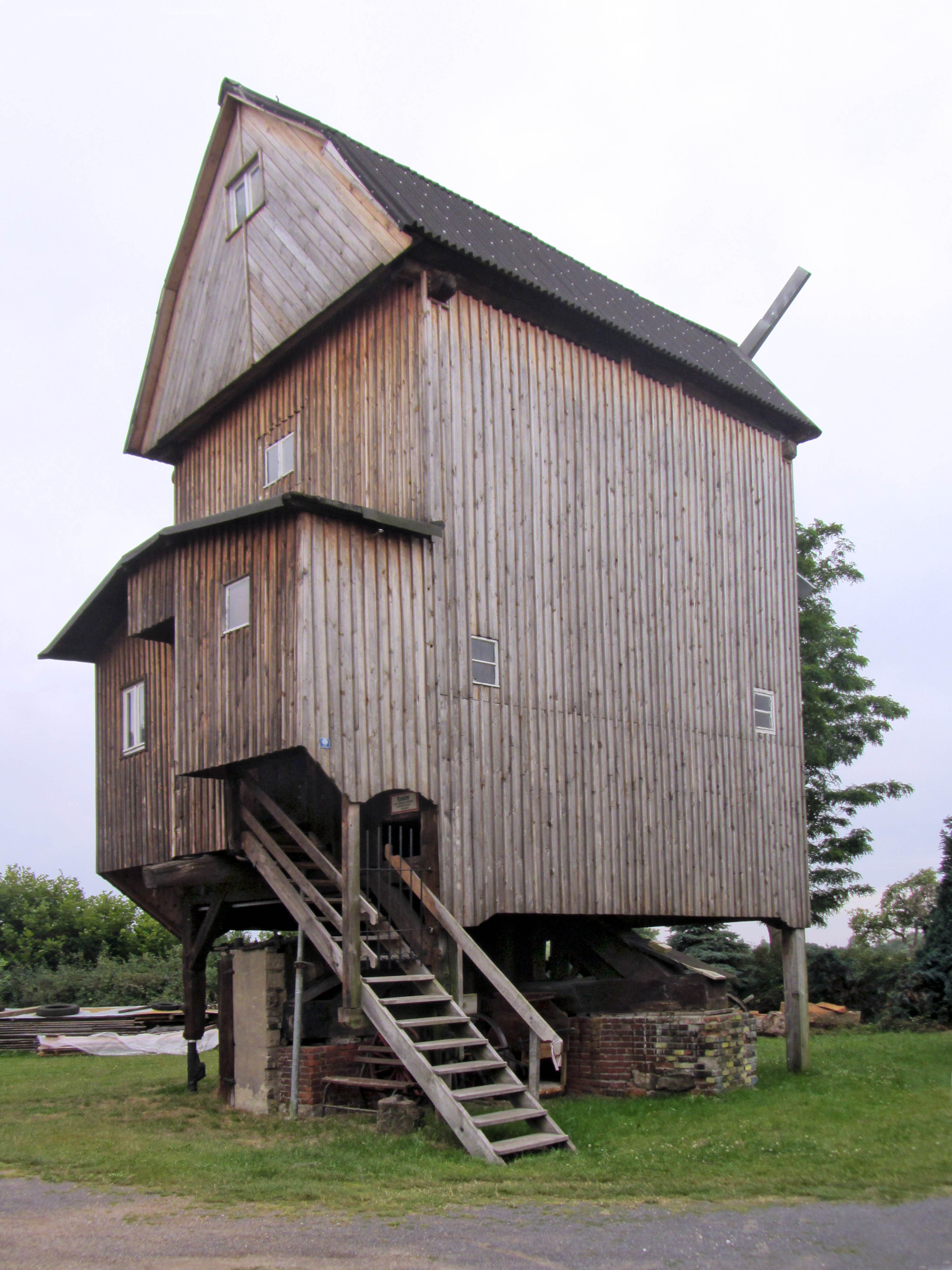 Bockwindmühle 1718 erbaut und 1723 von Beyern nach Drasdo umgesetzt, Langennaundorfer Straße 57 in Uebigau-Wahrenbrück OT Drasdo